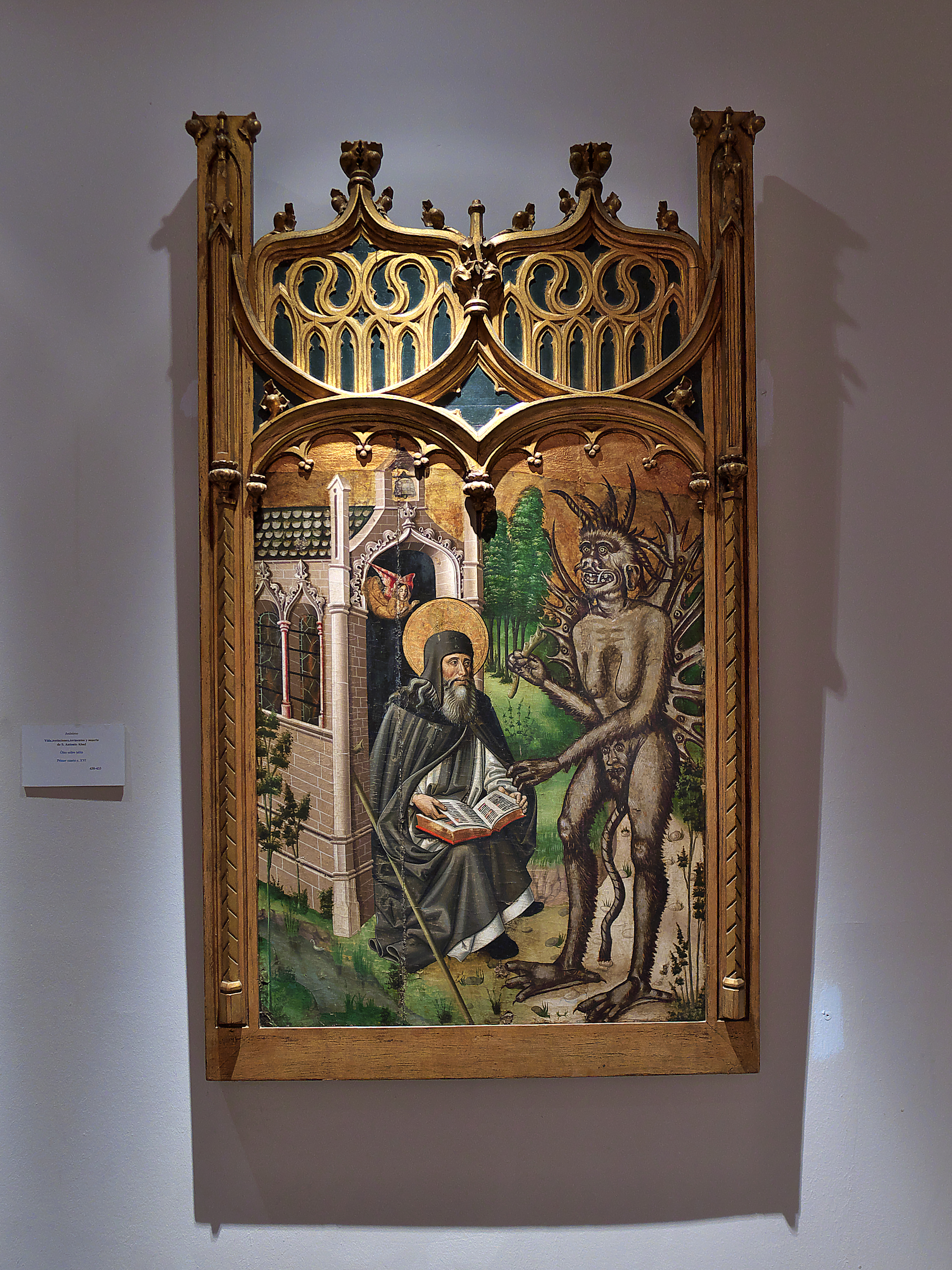 Museo de Astorga. Pintura hispano-flamenca, óleo sobre tabla, procedente del retablo de la Iglesia de Santa María de Villafáfila. Maestro de Villafáfila, primer cuarto del siglo XVI. La leyenda dorada difundió la vida del santo.